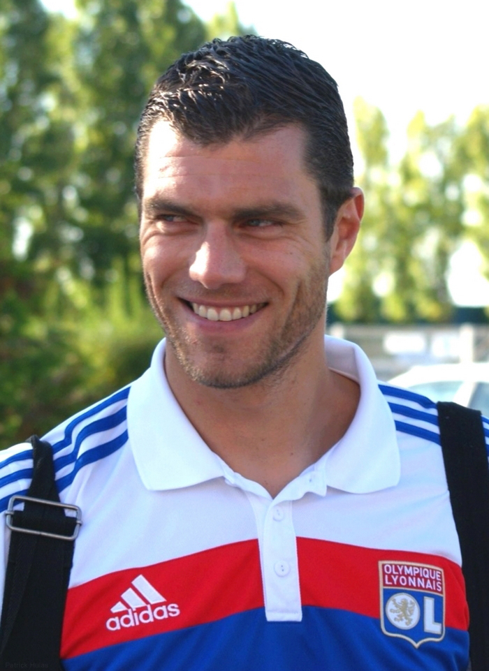 Gardien - Olympique Lyonnais (photo par Patrick Hulas)